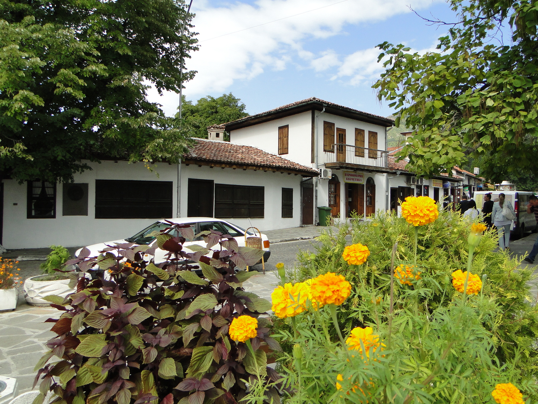 Сопот